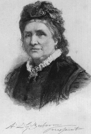 Anna Louisa Geertruida Bosboom-Toussaint